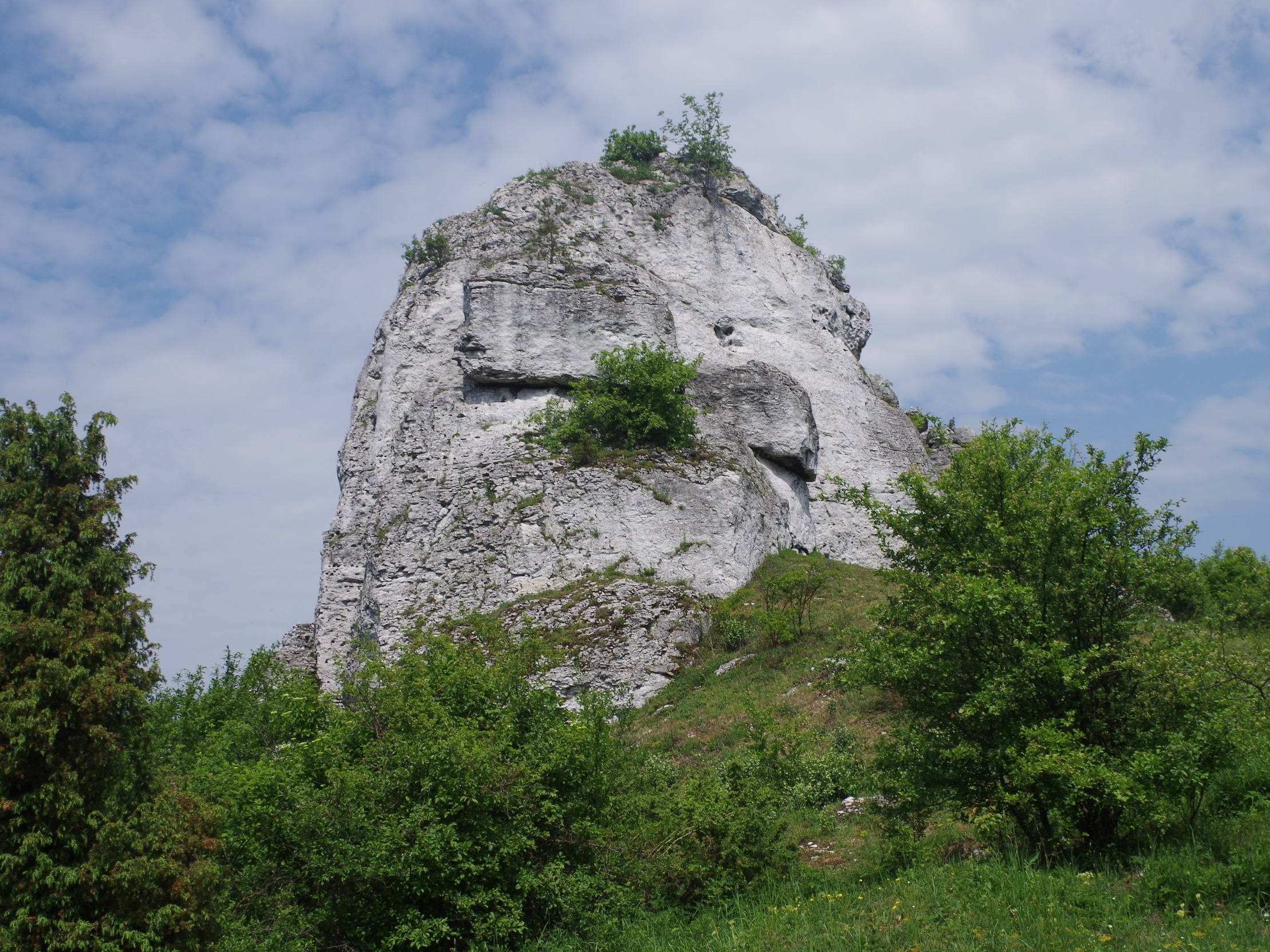 Skała Weselna w Straszykowych Skałach w Ryczowie